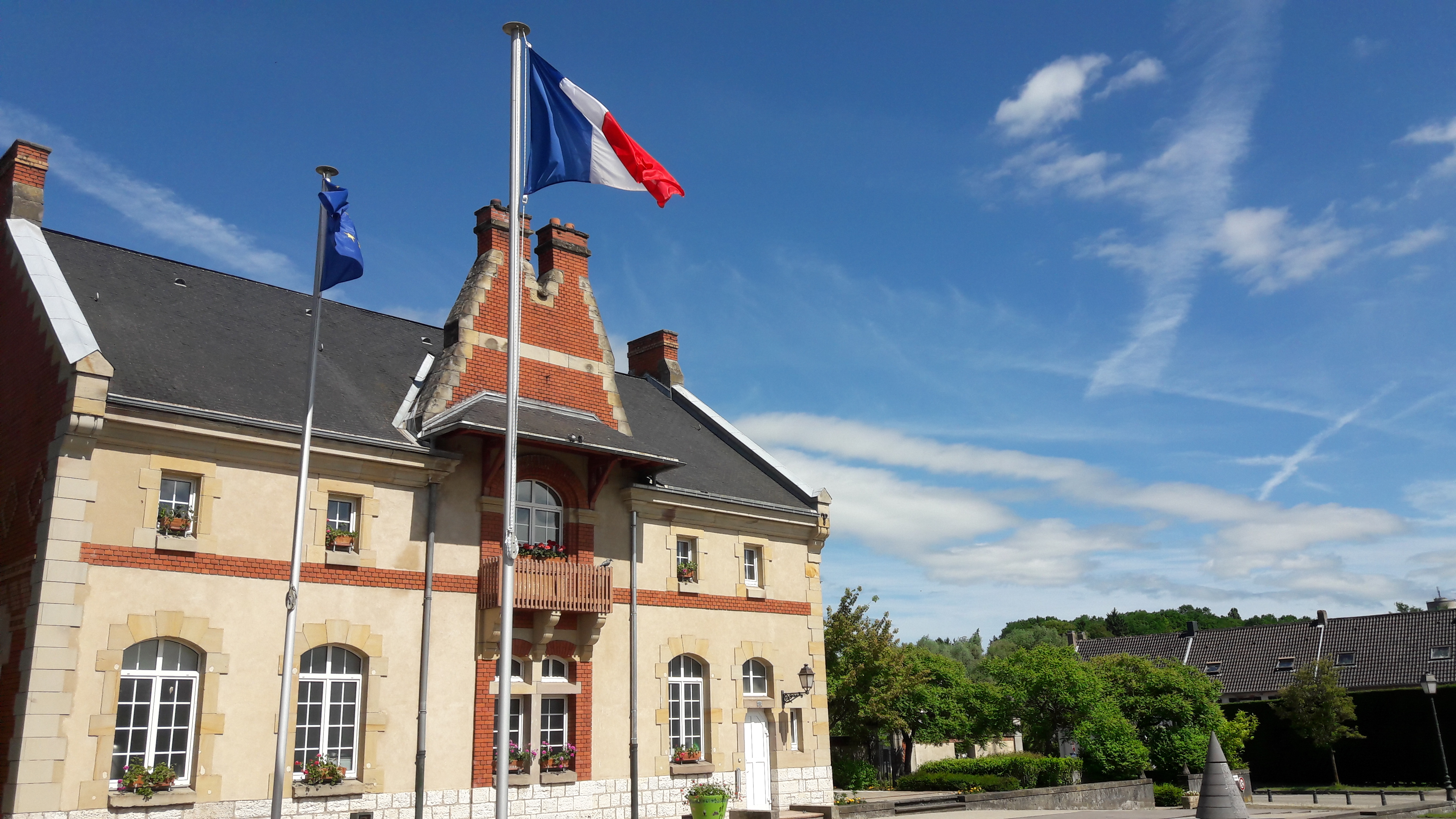 Château de Rémelfing (Mairie)